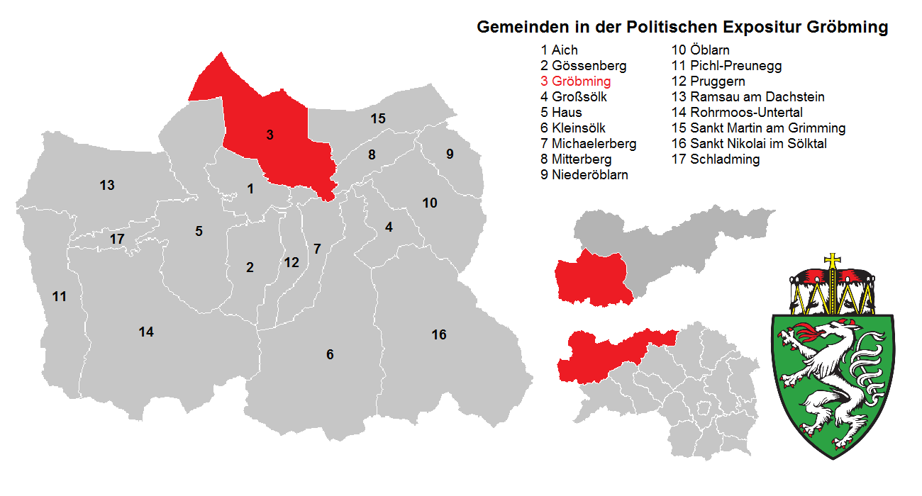 Expositur GrÃ¶bming